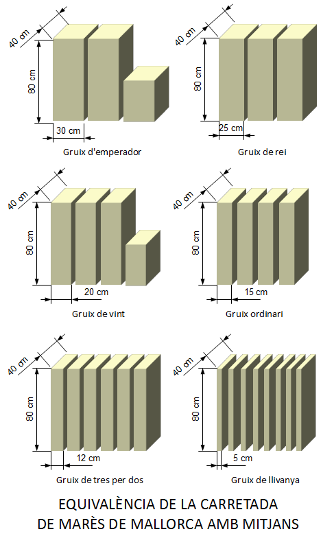 Carretada de marès de Mallorca amb diferents gruixes de mitjans de dimensions tradicionals.